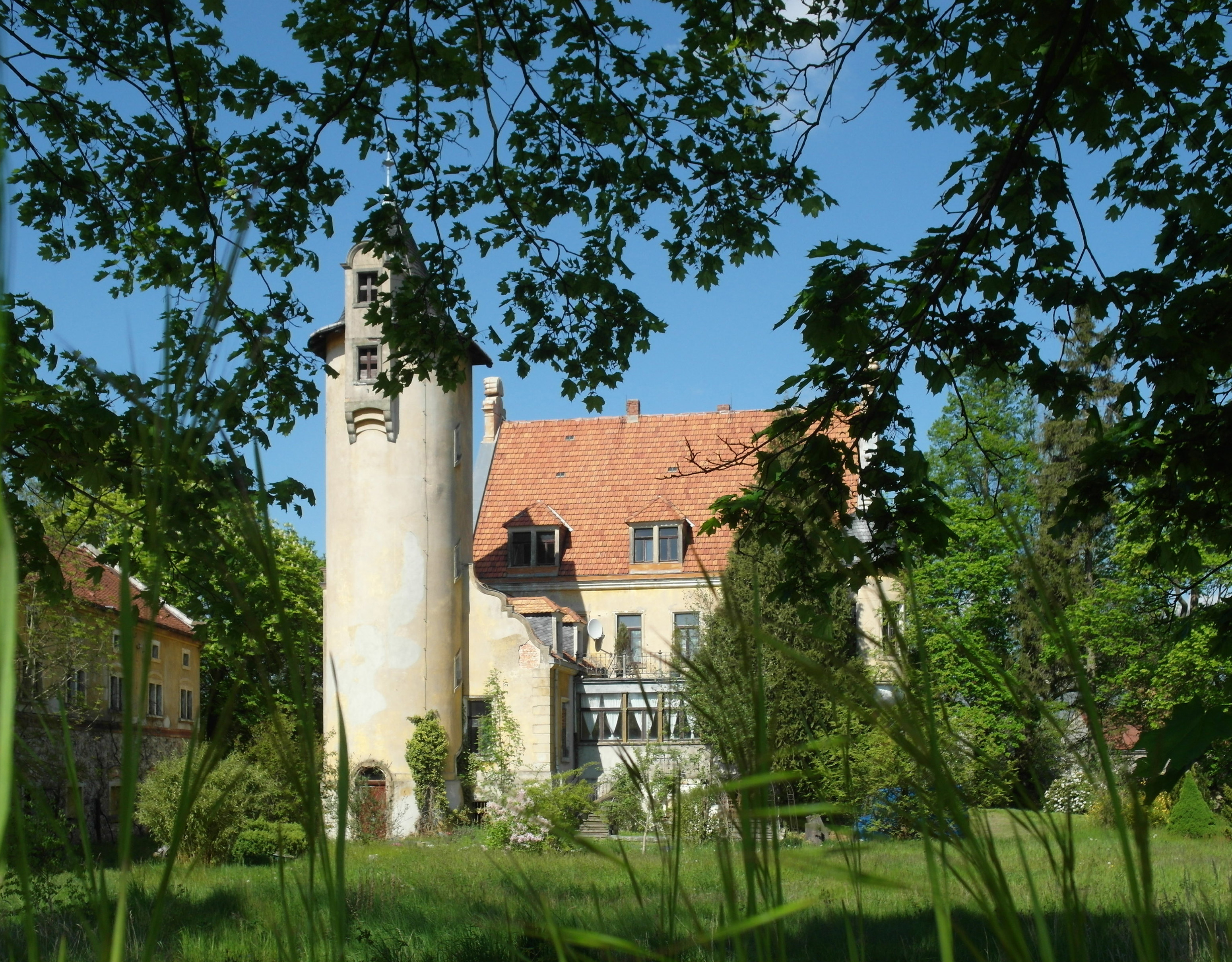 09.05.2016 01936 Schmorkau (Gemeinde Neukirch): Hauptstraße 2a. Sicht von SW. Das Märchenschloß wurde erst 1898 im Auftrag Nähmaschinenfabrikanten Bruno Naumann erbaut. Nach 1917 war es ein Offizierskasino, nachdem die Königsbrücker Heide als Truppenübungsplatz auserkoren worden war. Auch nach dem II. WK blieb das so. 1945 zogen Offiziere der Roten Armee ins Schloß. Nach deren Abzug 1992 verfielen die Gebäude. 1998 übernahm die Gemeinde das Anwesen und führte mit staatlichen Fördermitteln Erhaltungsarbeiten aus. 2002 wurde das Schloß an die Arkanum Vermögensverwaltung GmbH verkauft. [SAM5894.JPG]20160509835DR.JPG(c)Blobelt